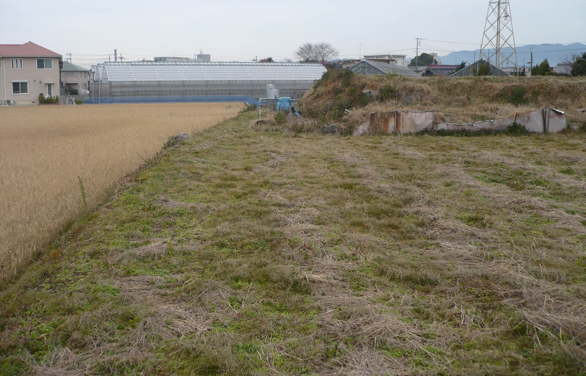 太田城水攻めの際の土塁跡